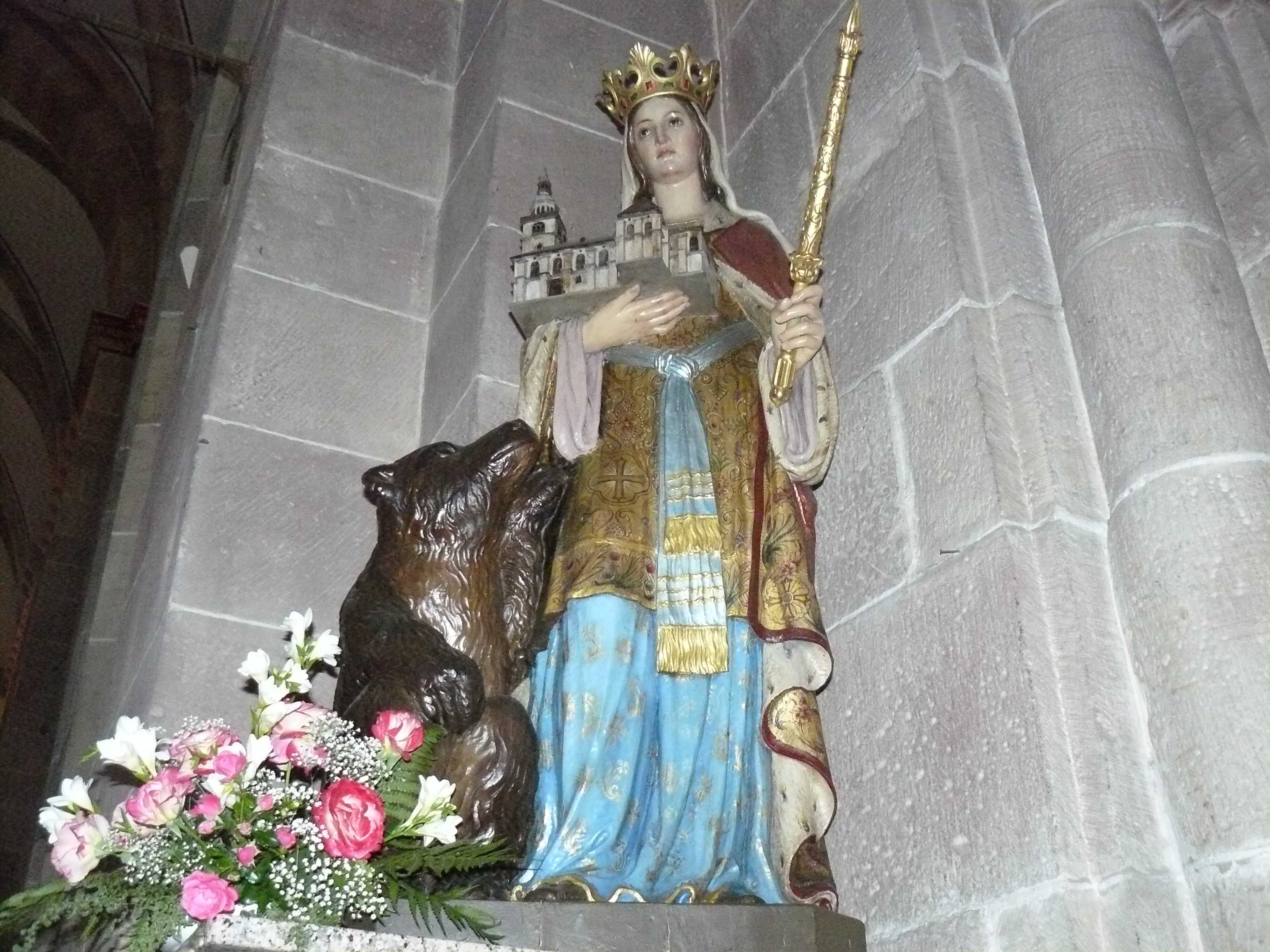 Statue de Sainte Richarde réalisée par un artiste du Tyrol